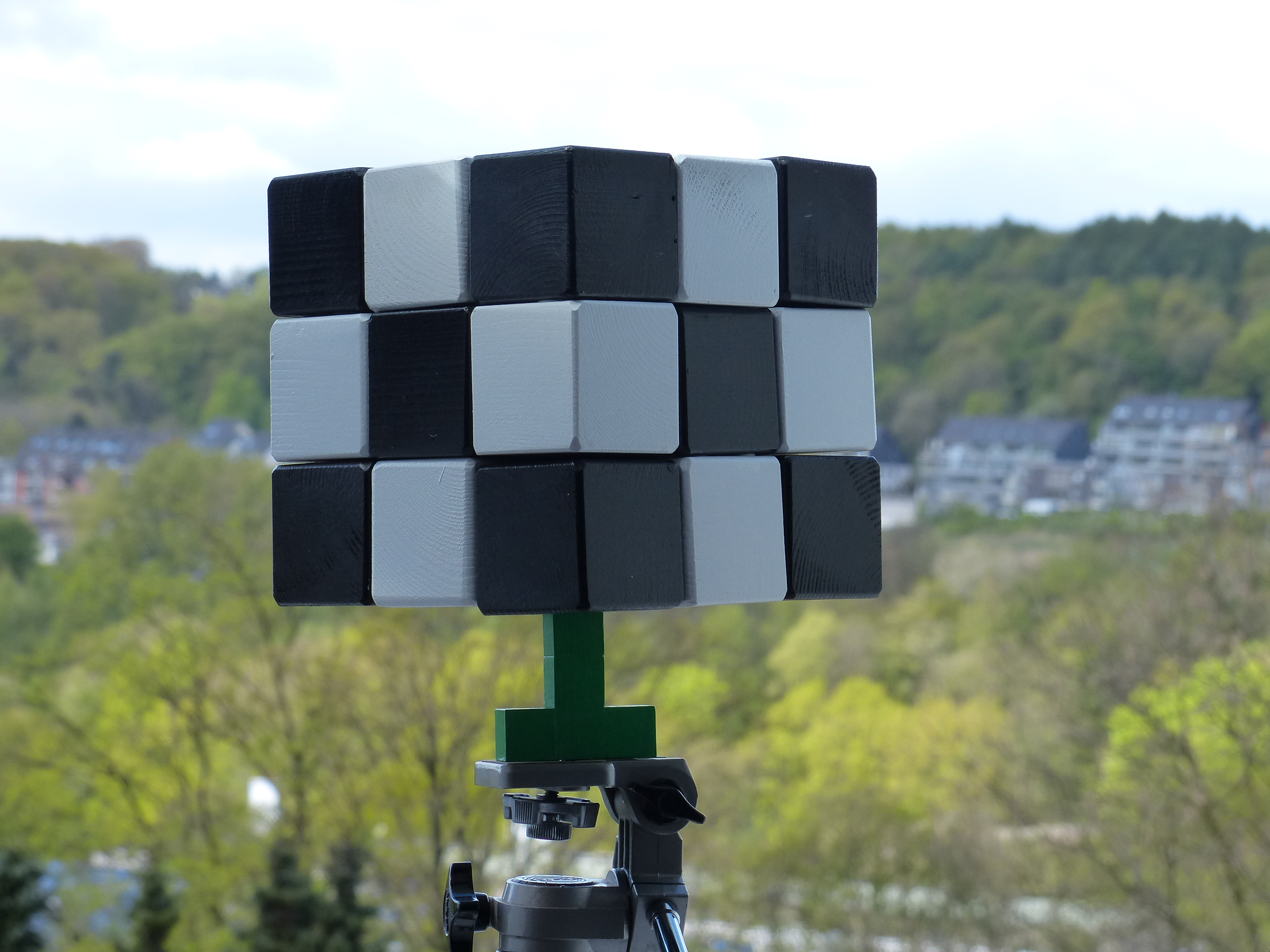 Soma Würfel, in schwarz-weiß für einen erhöhten Schwierigkeitsgrad zur Lösung der möglichen Aufgaben, hier eine von 9 bekannten Lösungen eines ausbalancierter Soma-Würfel, Arnold Schoger